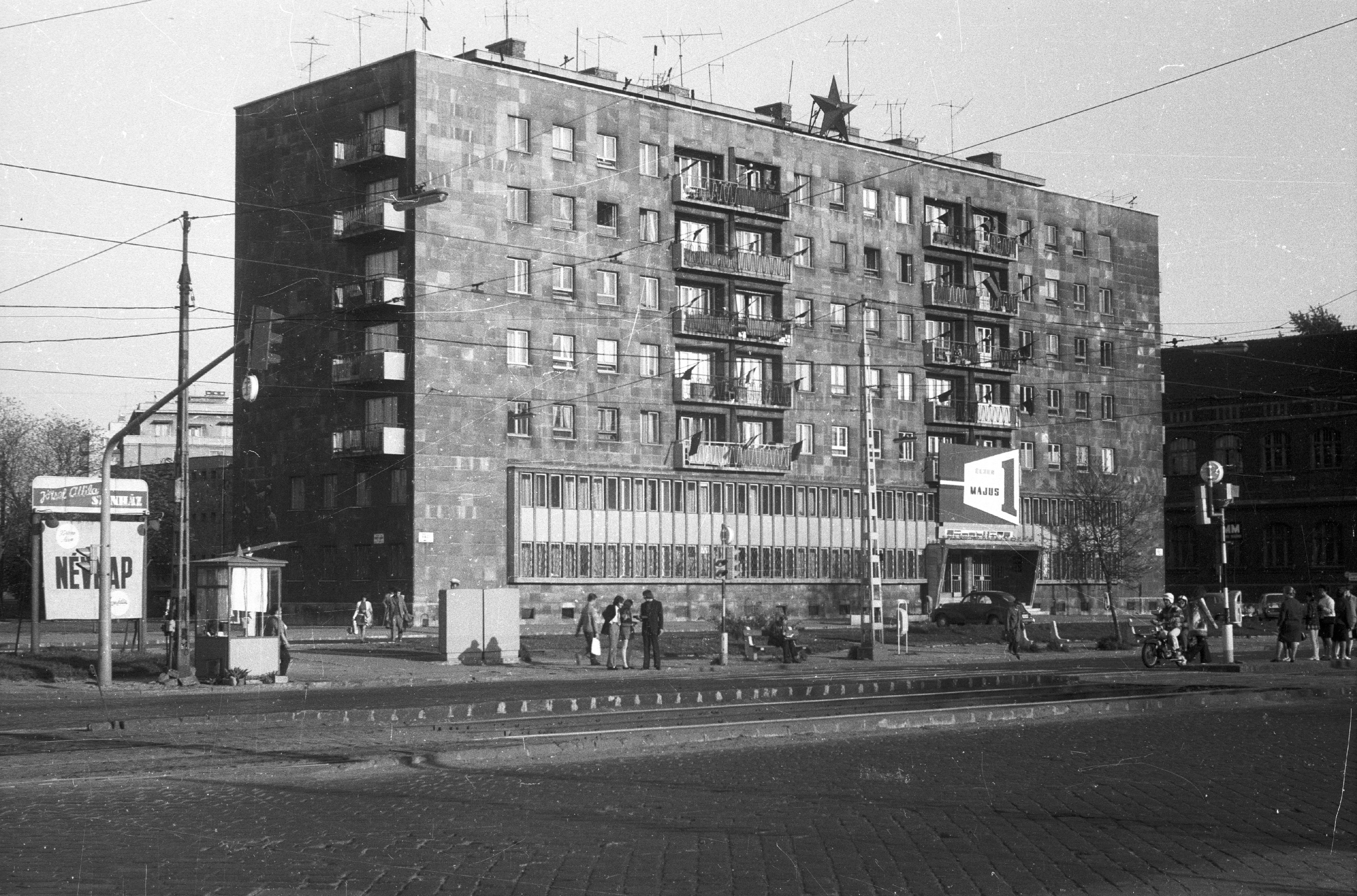 Váci út 63., kerületi pártház és lakóház, a József Attila színház bejárata. Location: Hungary, Budapest XIII. Tags: art of theater, Red Star, political decoration, Party Headquarters, Budapest Title: Váci út 63., kerületi pártház és lakóház, a József Attila színház bejárata.